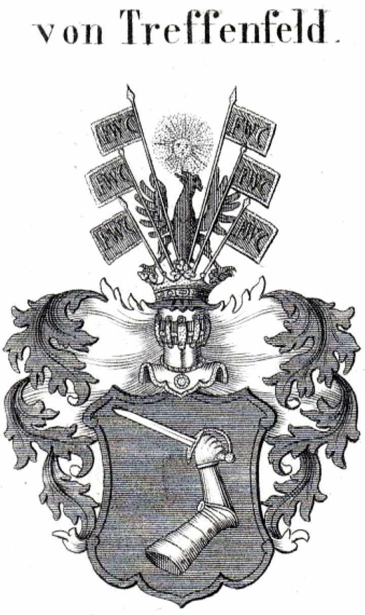 Wappen derer (Hennigs) von Treffenfeld.